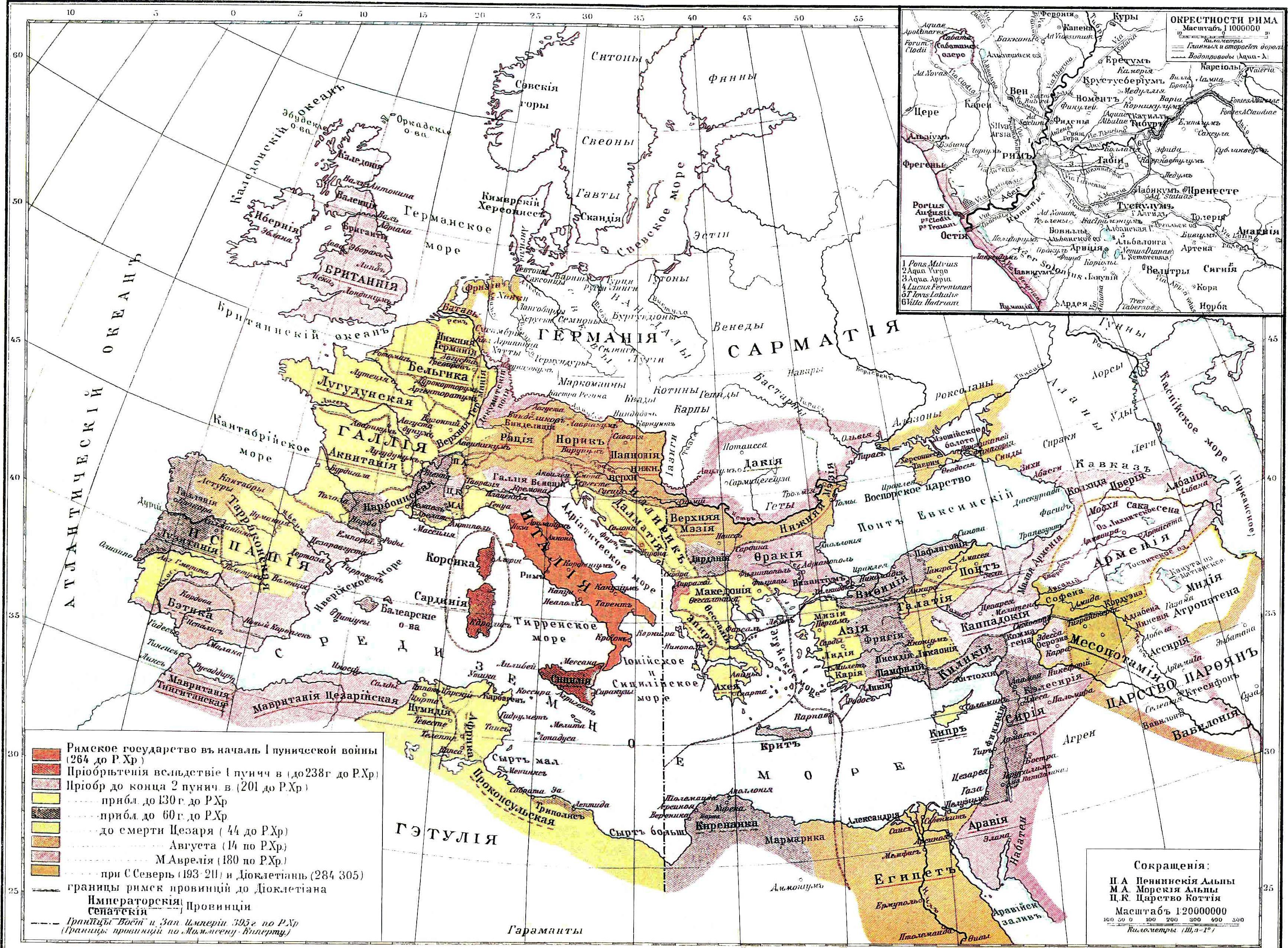 Карта Римской империи. Иллюстрация к статье Рим из энциклопедии Брокгауза и Ефрона